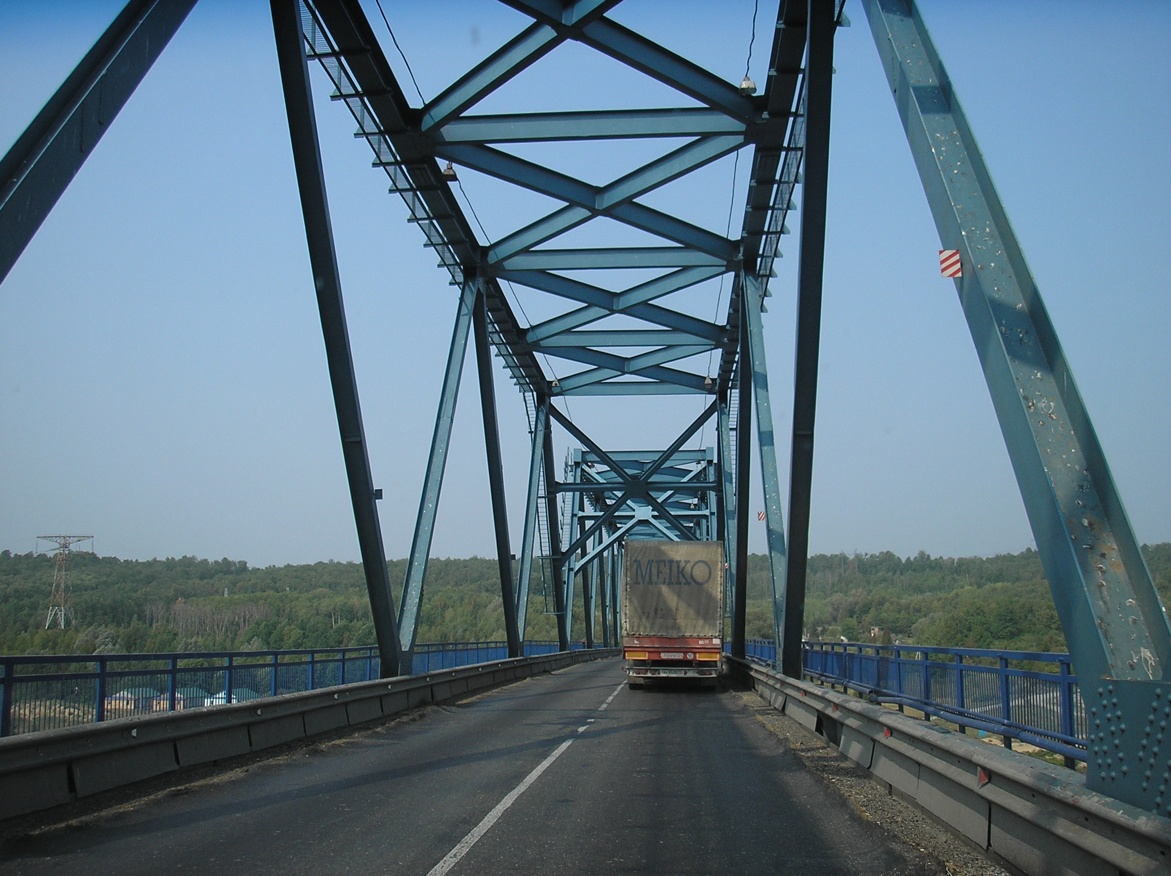 Автомобильный мост через р. Сура на М7